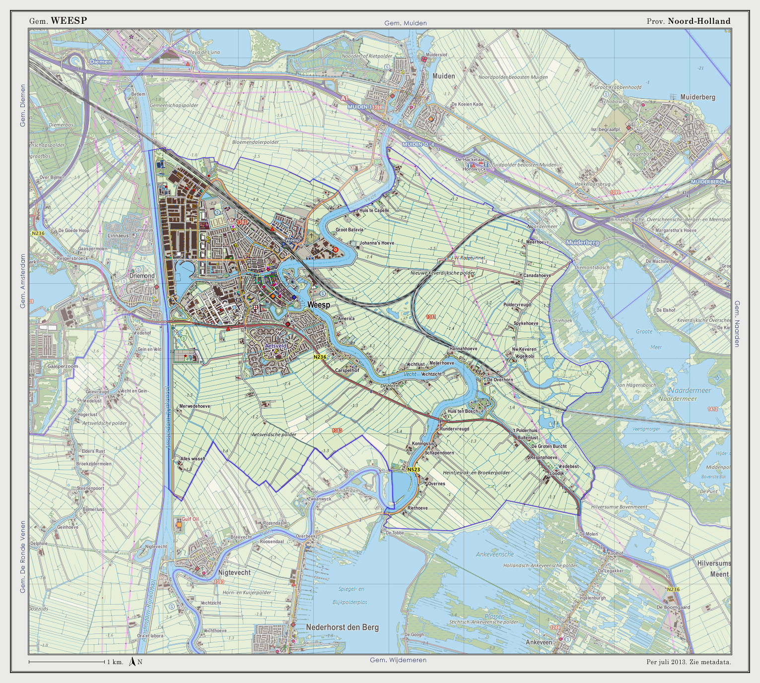 Topografische kaart van gemeente Weesp (2013). Samengesteld door Jan-Willem van Aalst op basis van de GML open geodata van de BRT/Top10NL (basisregistratie Topografie, Kadaster 2011), vrijgegeven door Kadaster onder de Creative Commons BY licentie. Additionele gegevens uit BAG (8 juli 2013), uit de Open Street Map (9 juli 2013) en uit de Risicokaart. Peildatum kaartbeeld: 9 juli 2013. Zie ook Gemeentenatlas.nl Samenstelling en kleurenschema: Jan-Willem van Aalst, met QuantumGIS en Photoshop. Zie ook de Legenda.